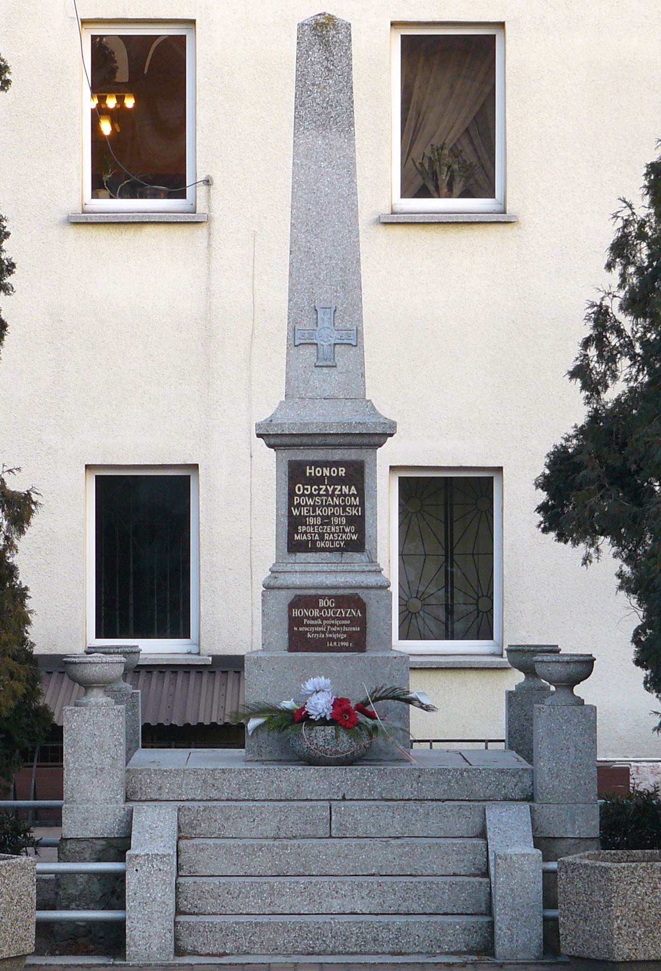 Raszków - pomnik Powstańców Wlkp.